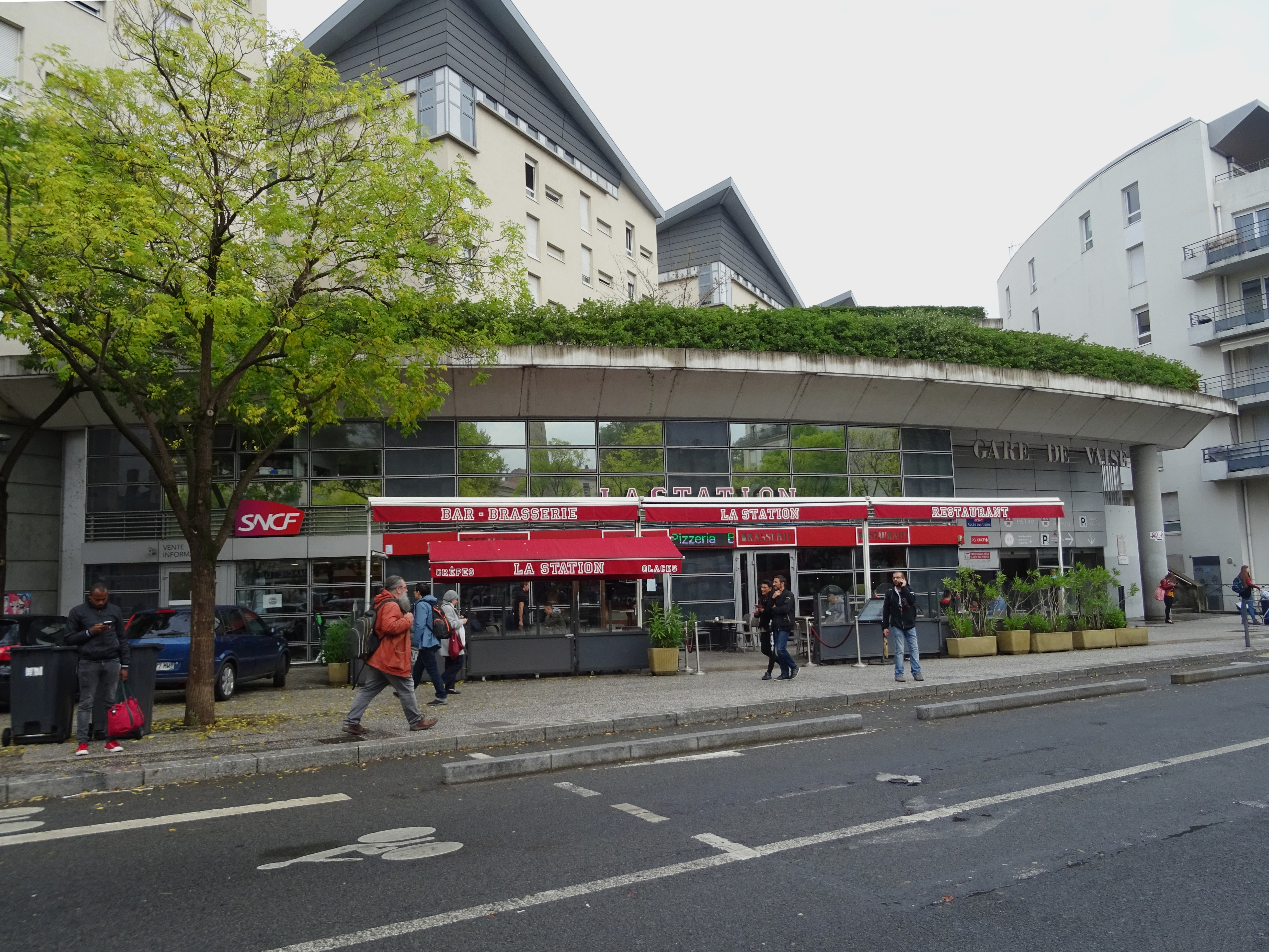 Bâtiment voyageurs de la gare de Lyon-Vaise.